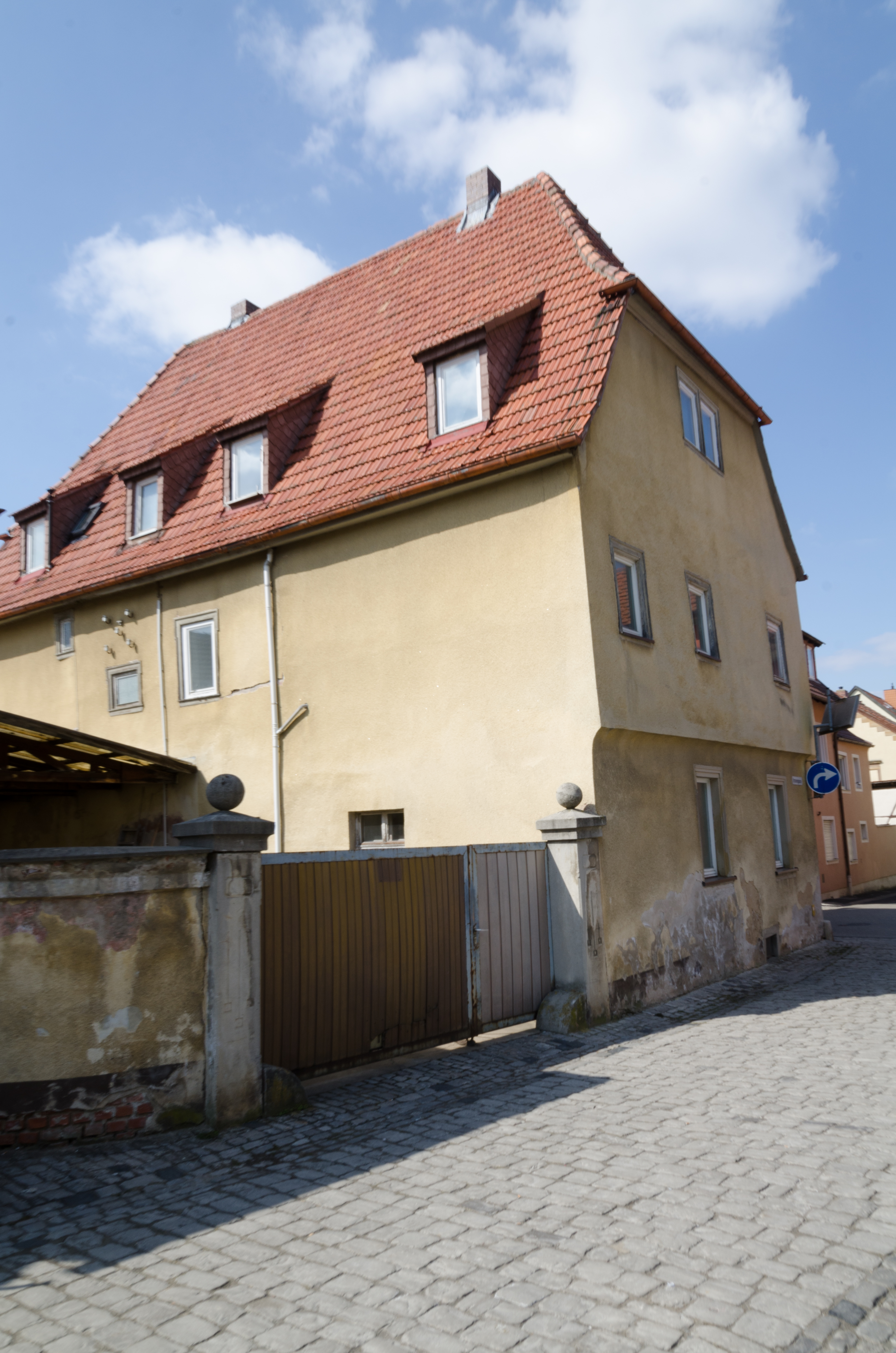 Gerolzhofen, Weiße Turm Straße 8